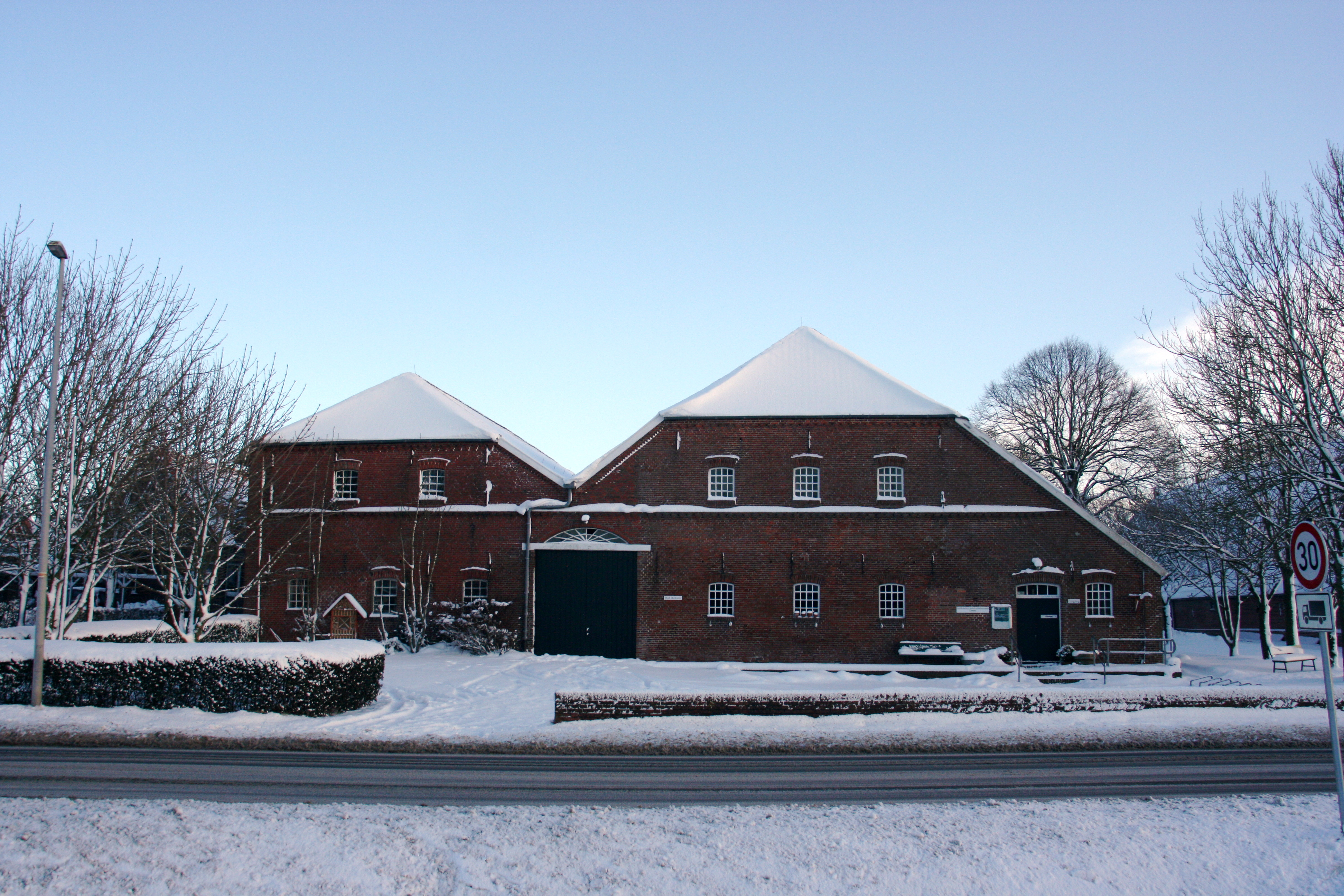 Campen (Krummhörn), Niedersachsen: Landwirtschaftsmuseum